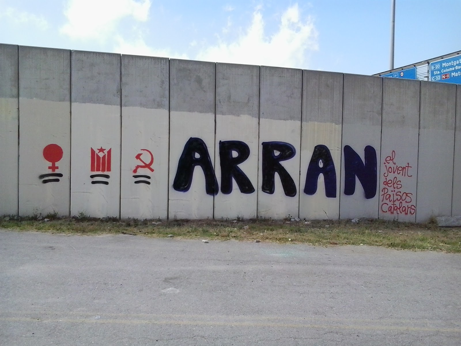 Propaganda of the Catalan youth organization Arran.